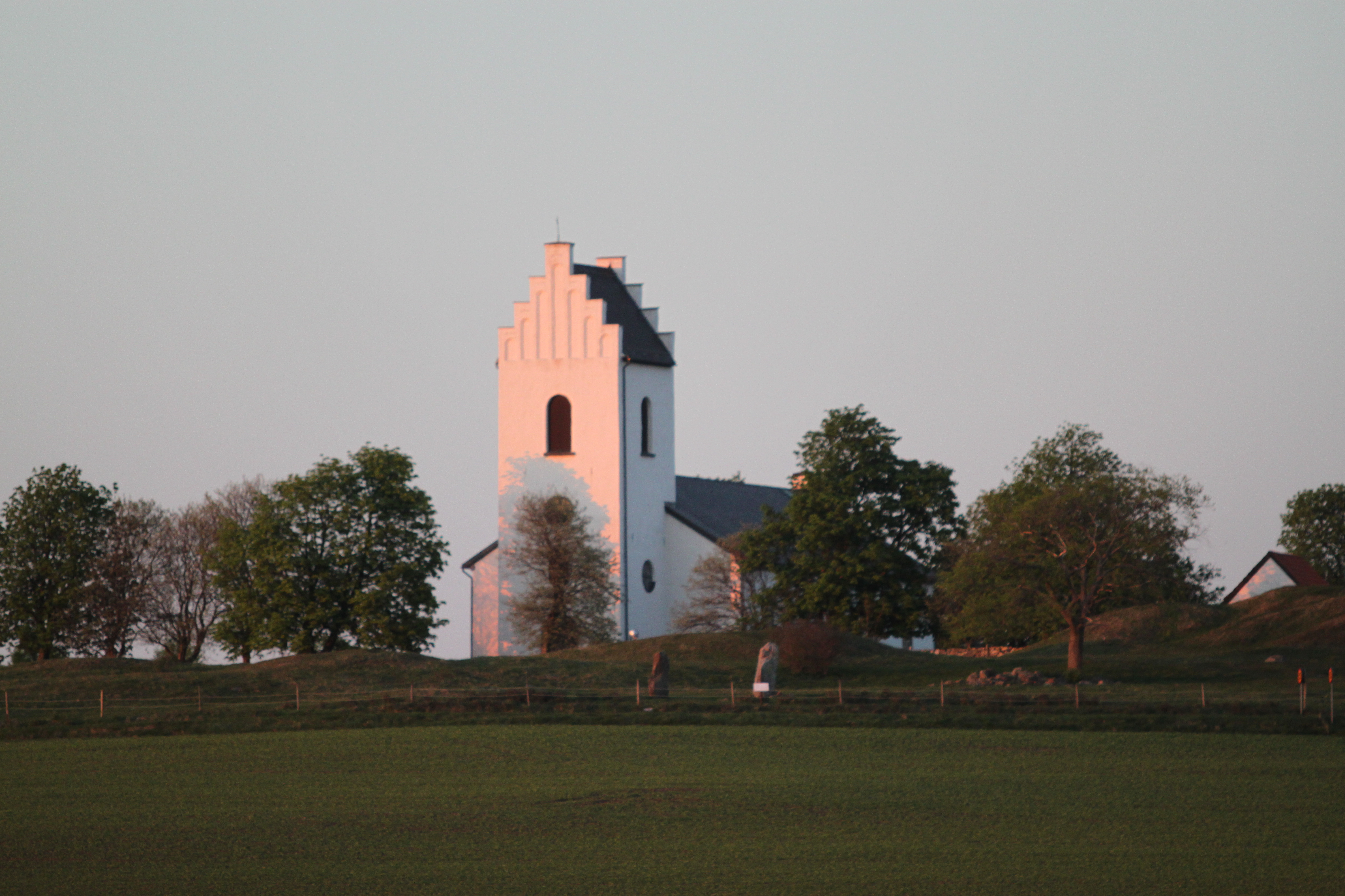 Hovs kyrka